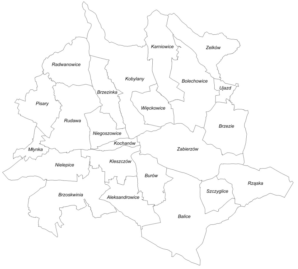 Mapa Gminy Zabierzów